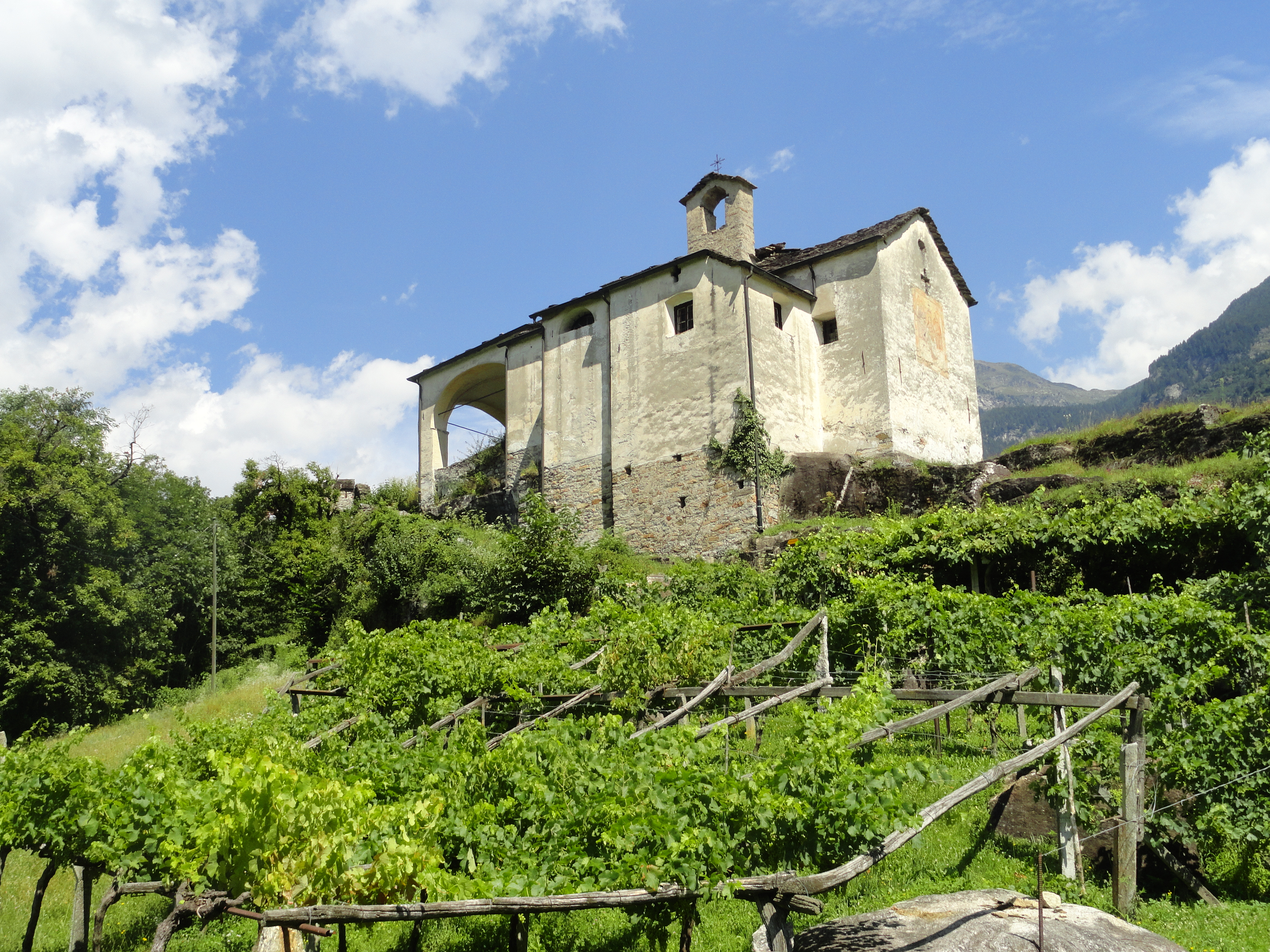 Kirche Santa Maria bei der Burg Serravalle